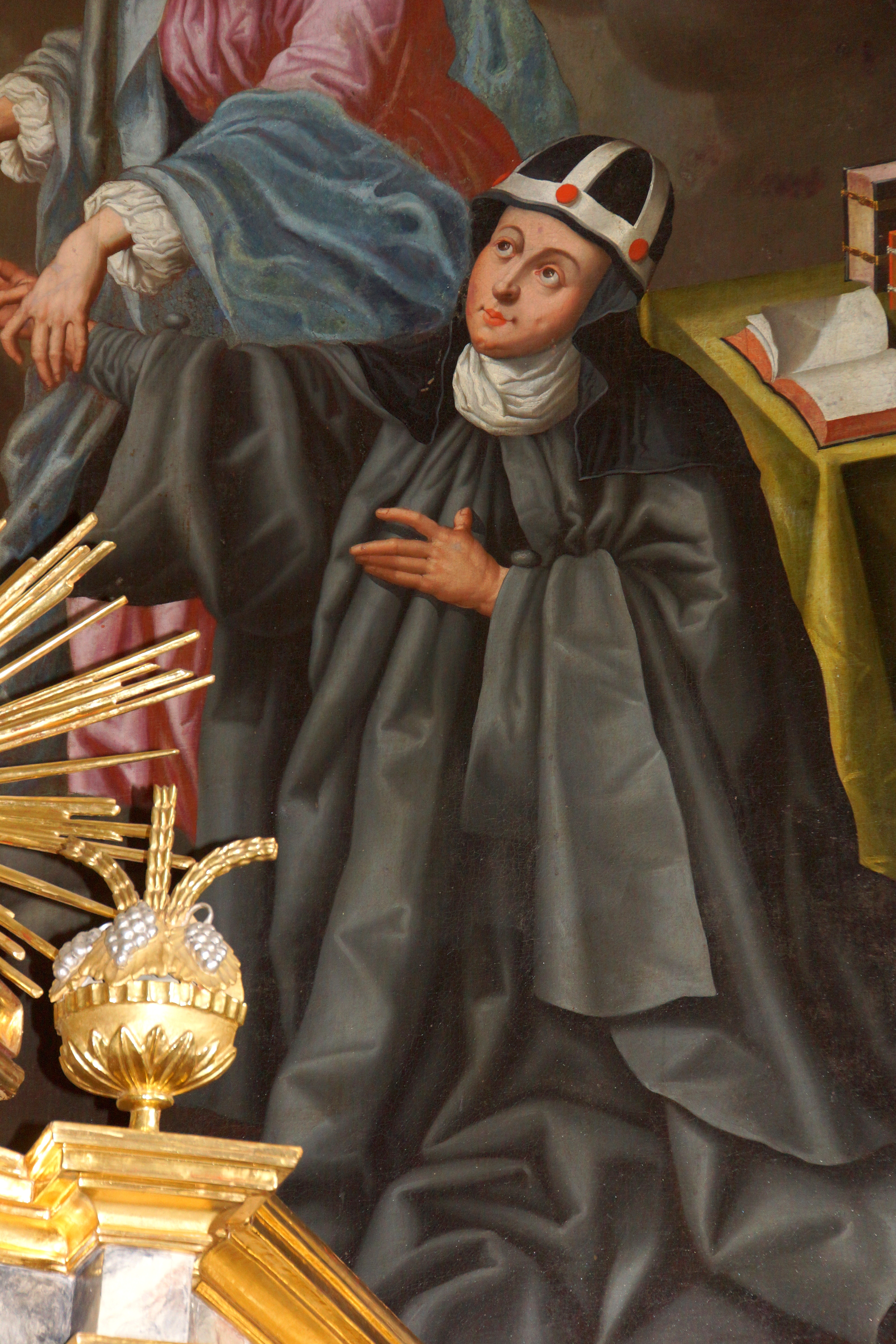 Die Pfarrkirche St. Birgitta in Gnadenberg bei Berg in der Oberpfalz